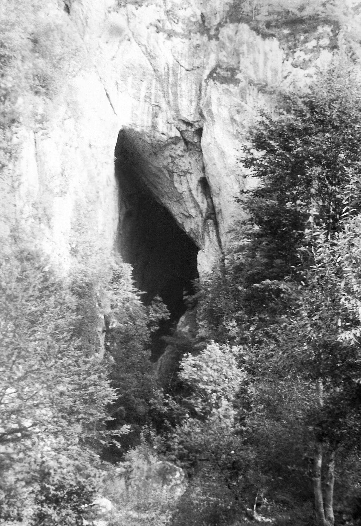 A szolcsvai Búvópatak barlangjának bejárata, Erdély